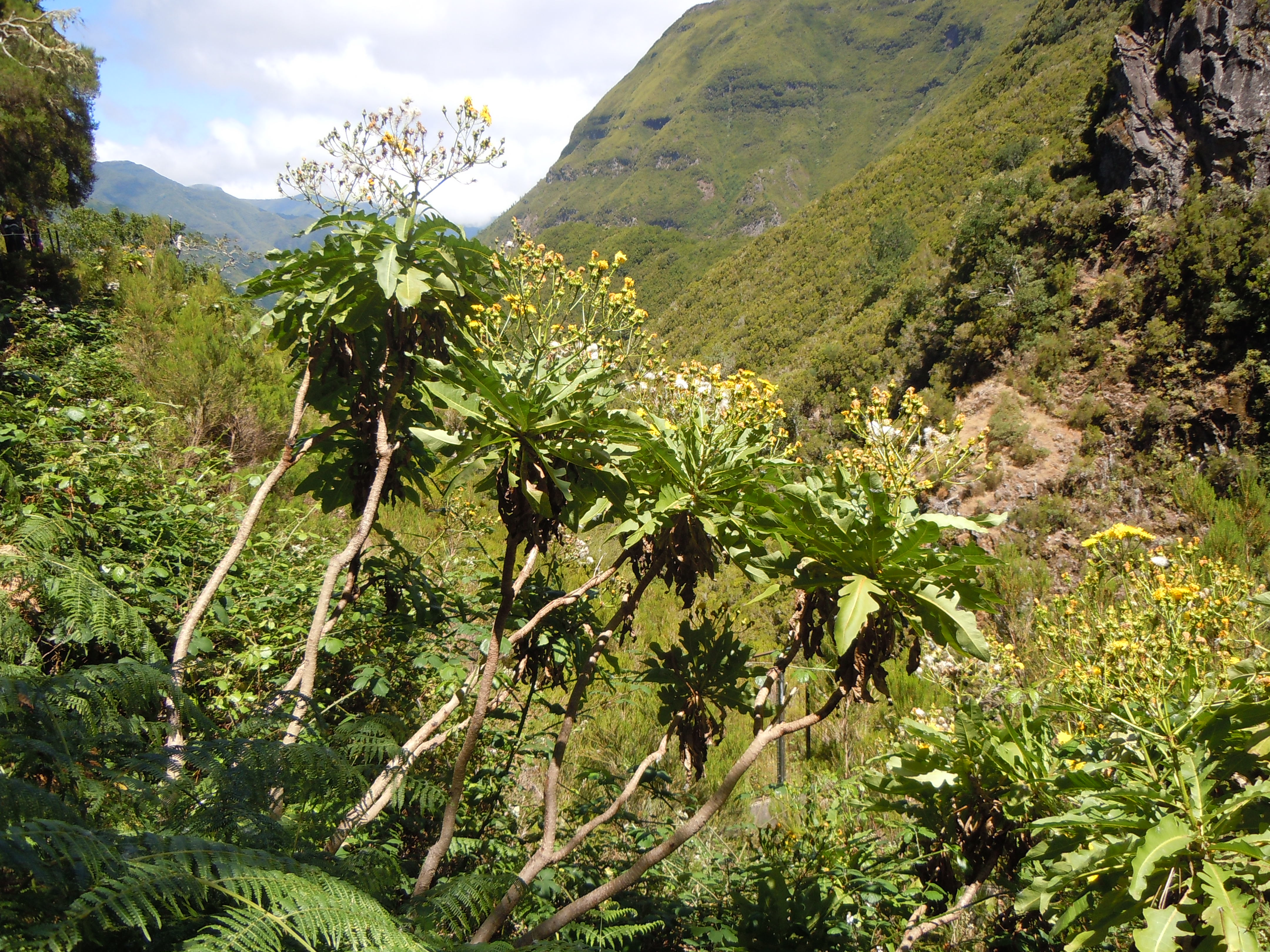 Levada das 25 Fontes - Madere